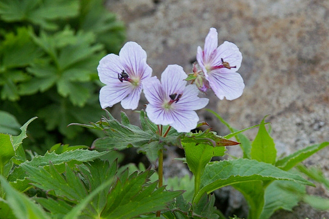 チシマフウロ（北海道富良野岳） Geranium erianthum (Mt. Furanodake, Hokkaido, JAPAN)